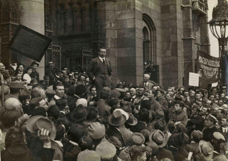 Béla Kun celebrando la toma de Kosice (Kassa) el 7 de junio de 1919.